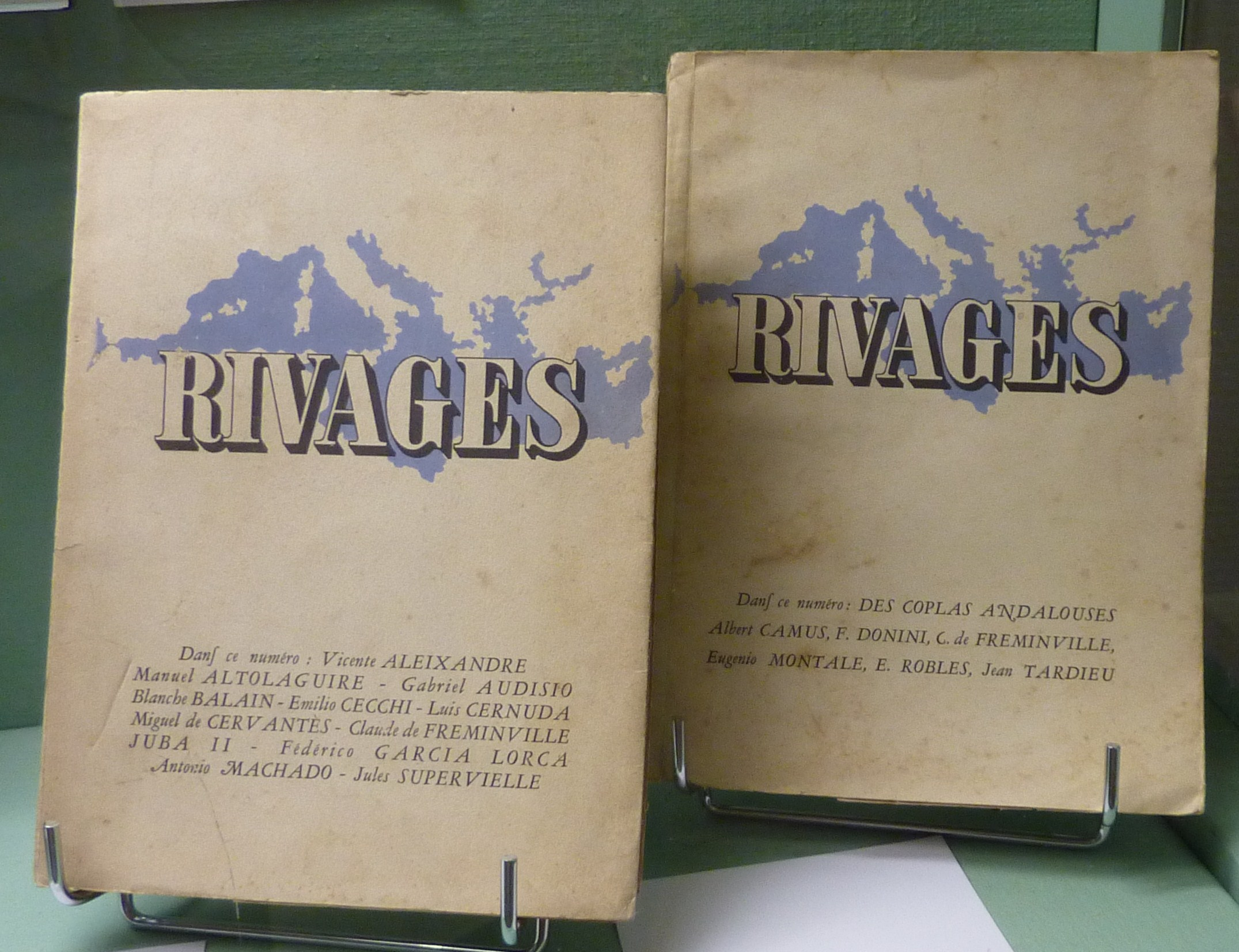 Les deux numéros de la revue "Rivages" publiée à Alger par Edmond Charlot et dirigée par Albert Camus. Documents présentés à l'exposition organisée en 2015 par le musée de Pézenas en hommage à Edmond Charlot.